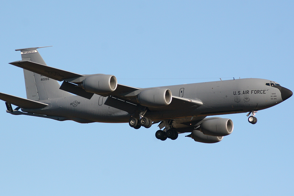 Boeing KC-135 Stratotanker Pennsylvania ANG 80055